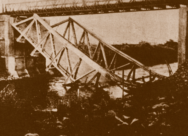 גשר שיח' חוסיין קרס לתוך הירדן 1946 ארכיון ההגנה